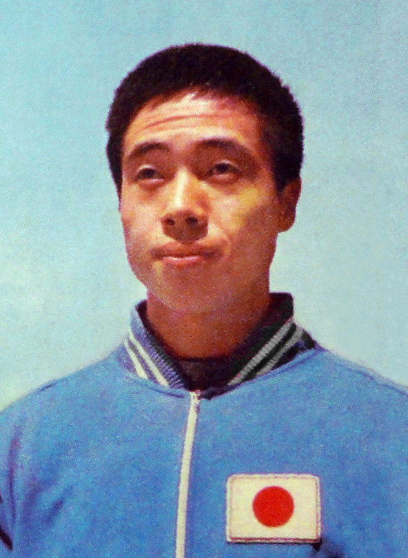 Figurina CAMPIONI DELLO SPORT 1970/71-n.177-KATO-GINNASTICA